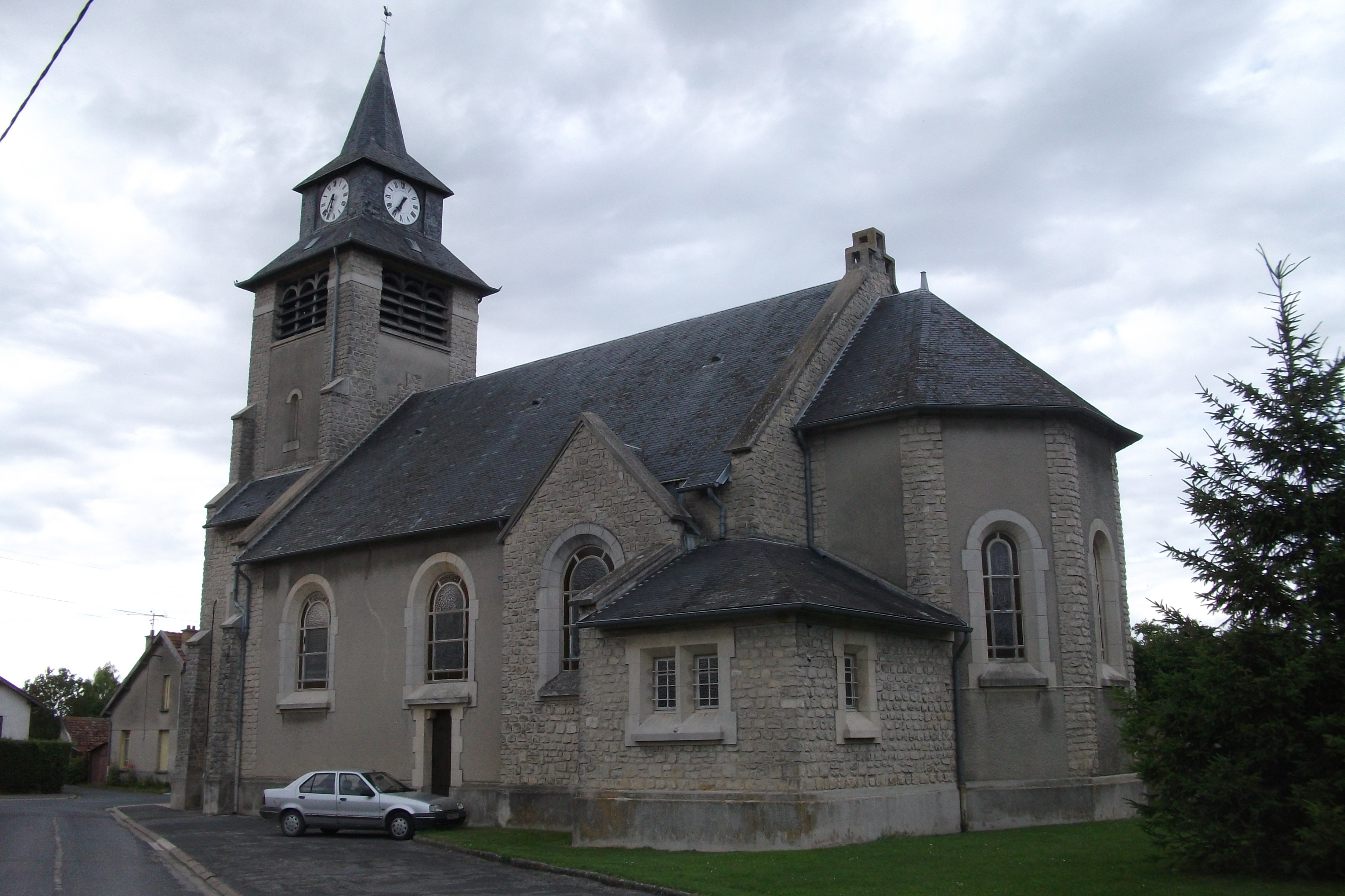 Arrière de l'église de Prunay .